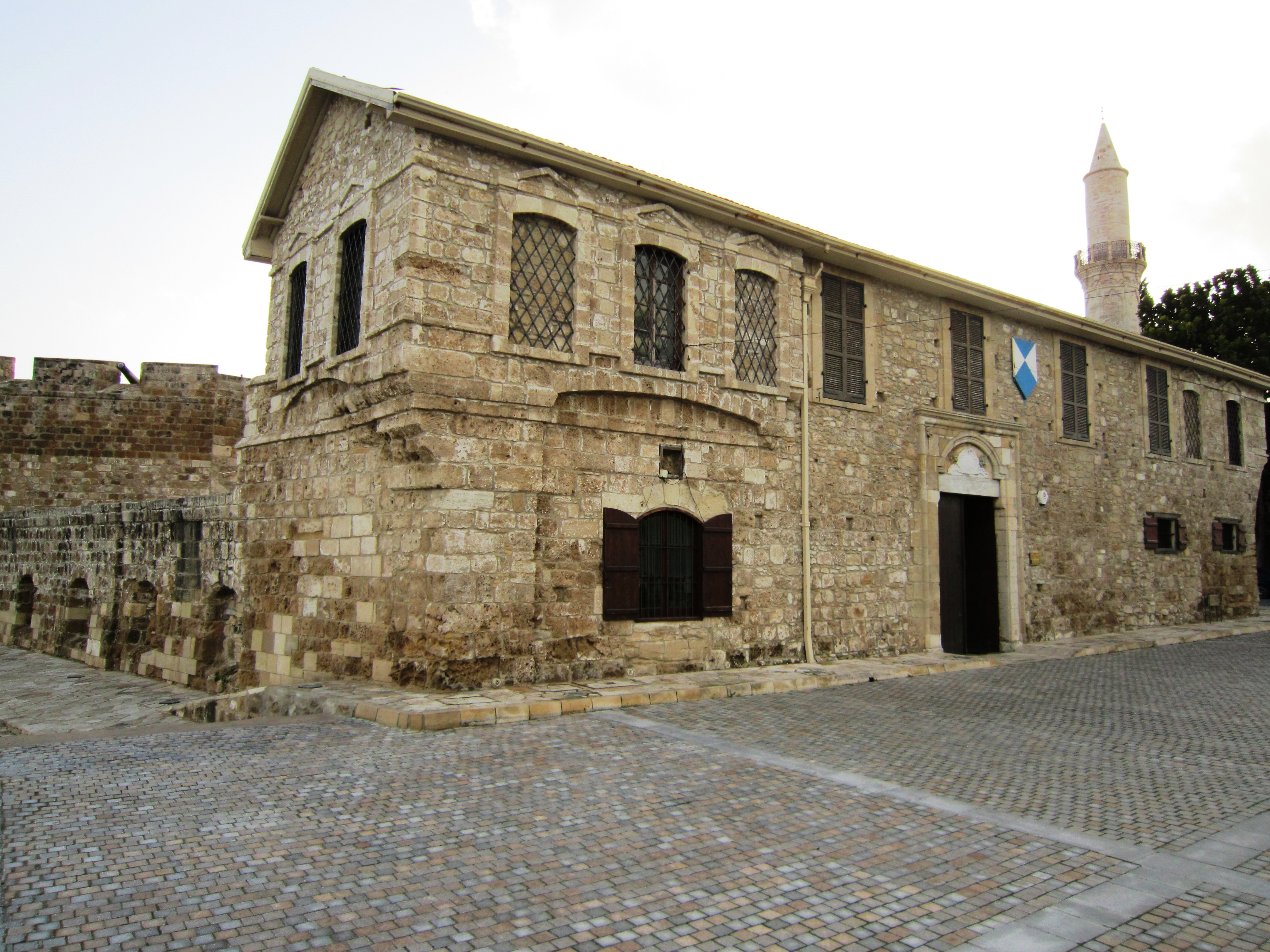 Cyprus - Larnacacastle 1